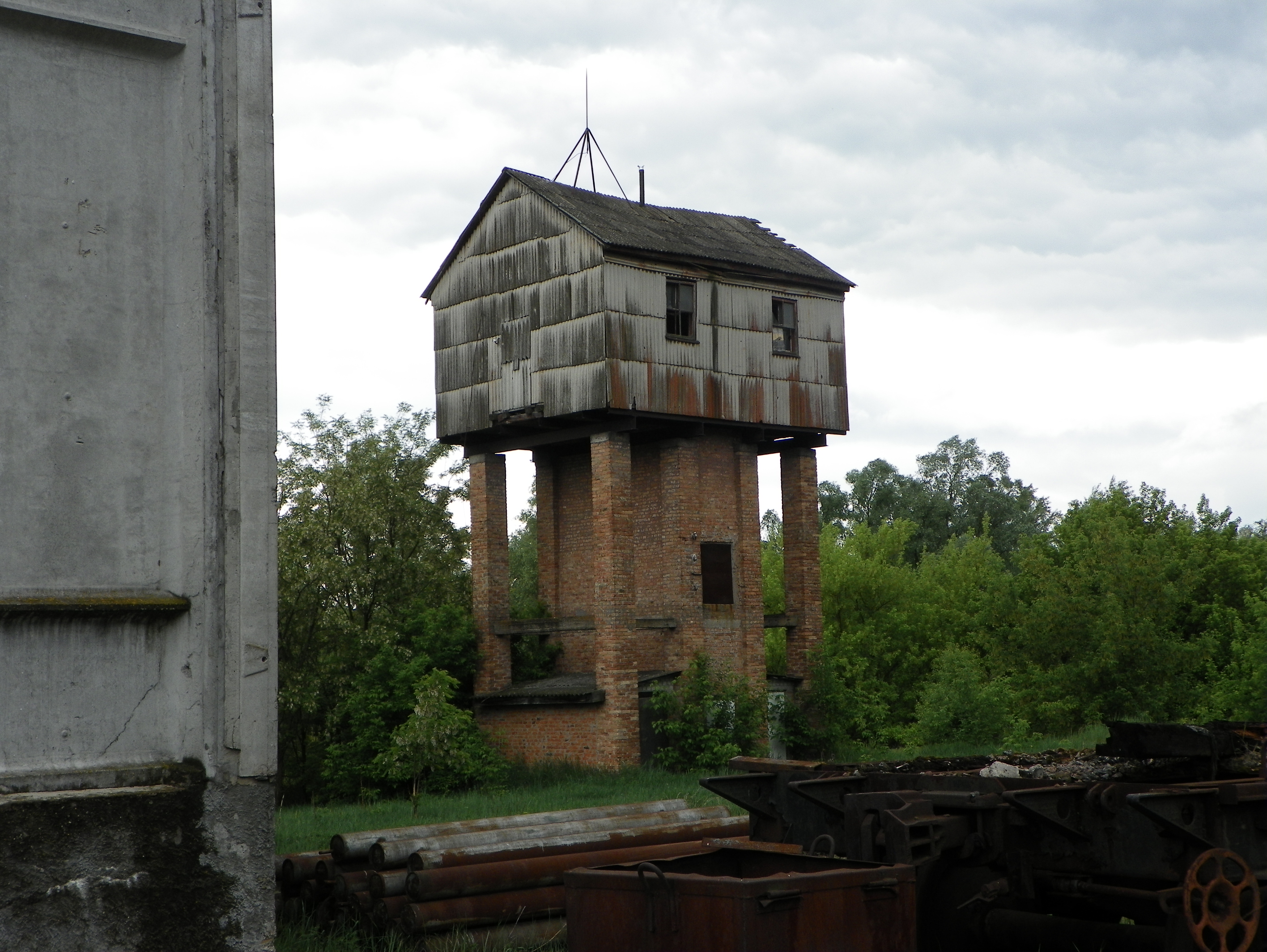 Залізнична станція "Янів" у Чорнобильській зоні